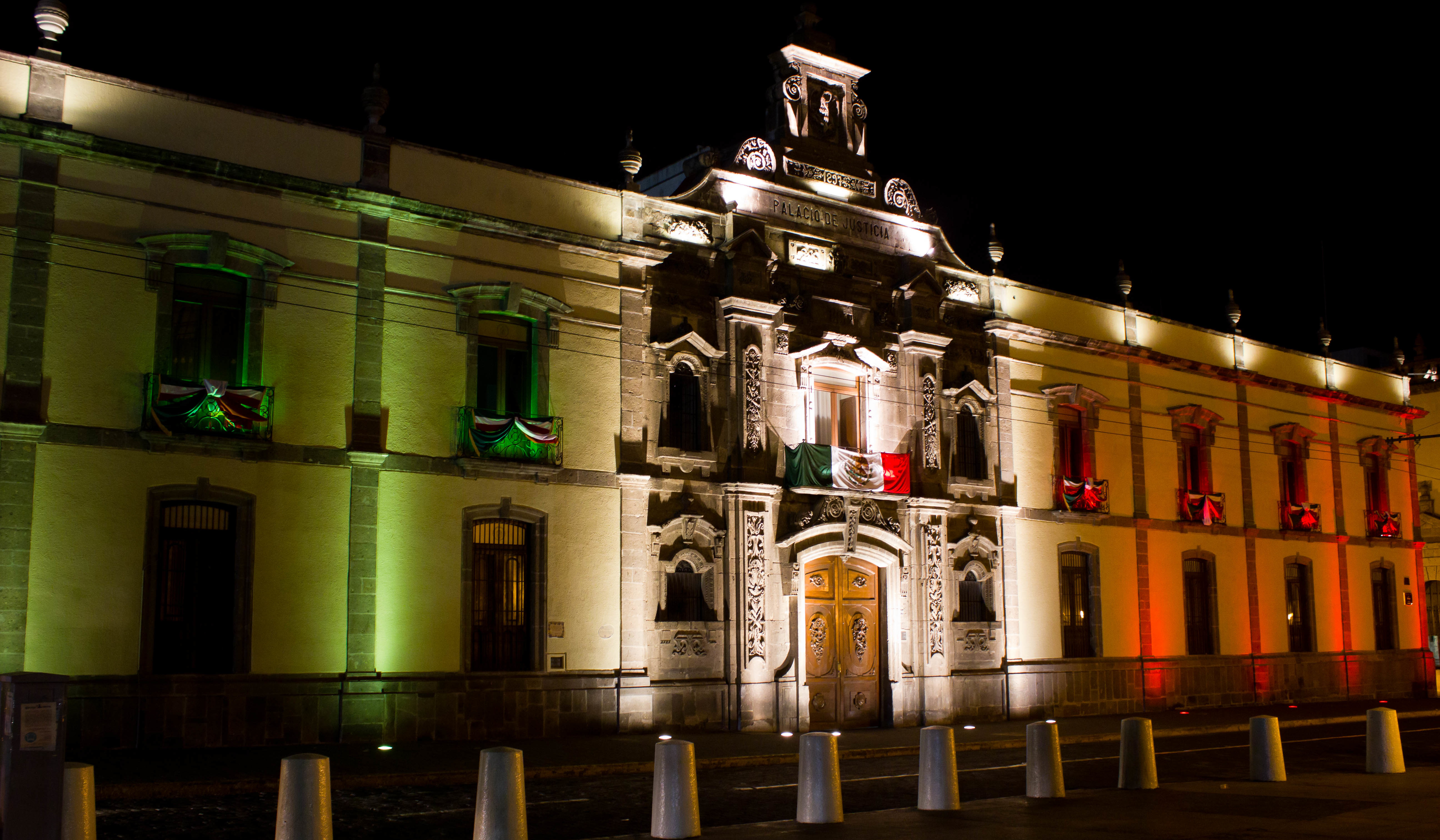 Palacio de Justicia en la noche.